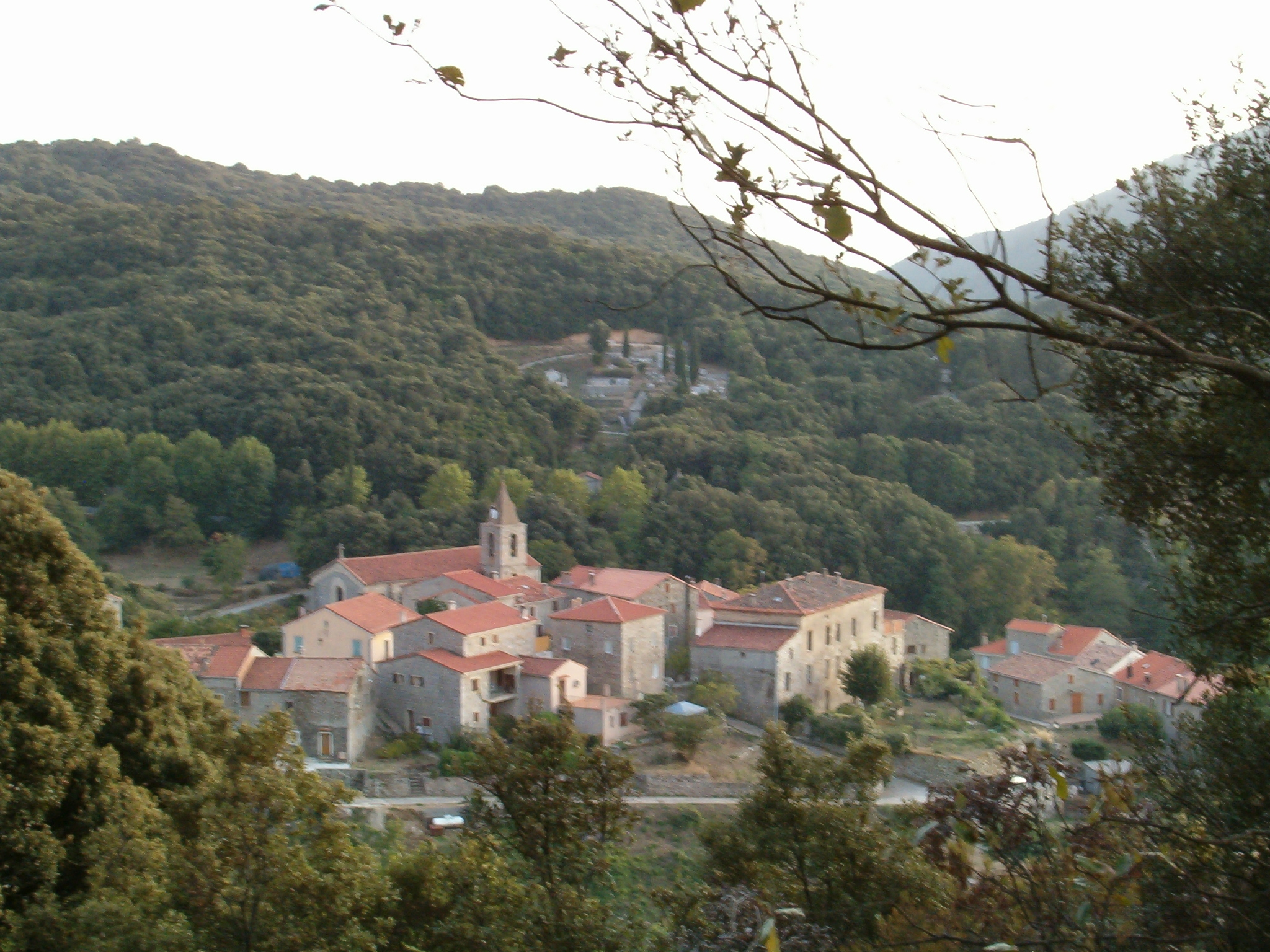 photo du village de CASALABRIVA